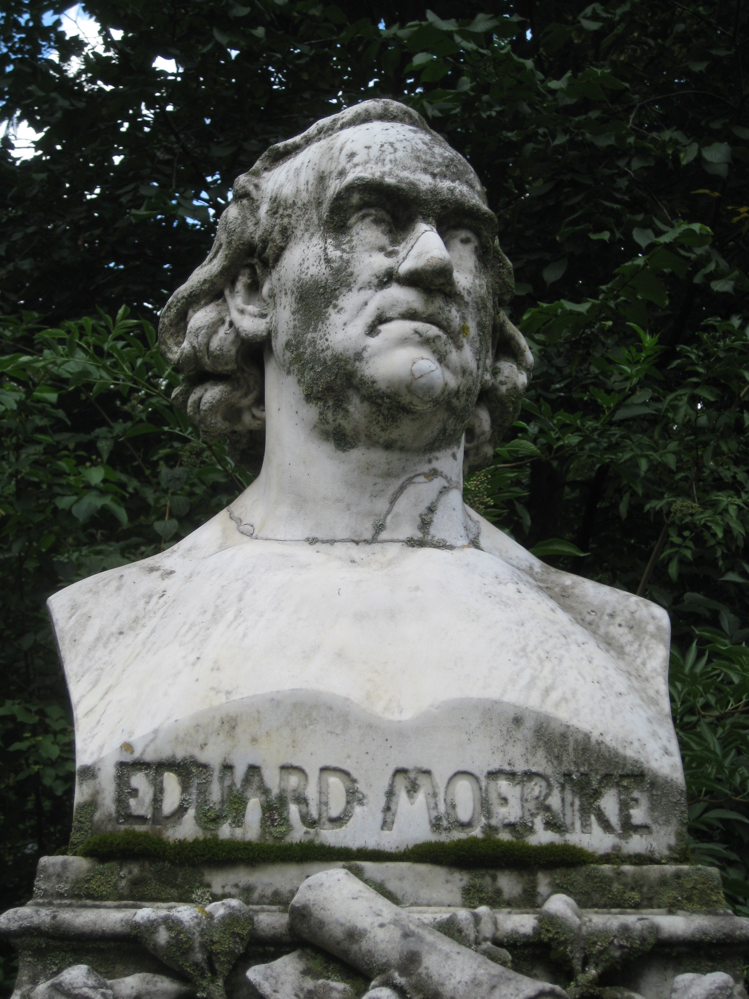 Wilhelm Rösch: Mörike-Denkmal, Marmorbüste Eduard Mörikes, Entstehungsjahr 1879-1880, Stuttgart, Silberburganlage, gegenüber Silberburgstraße 193.